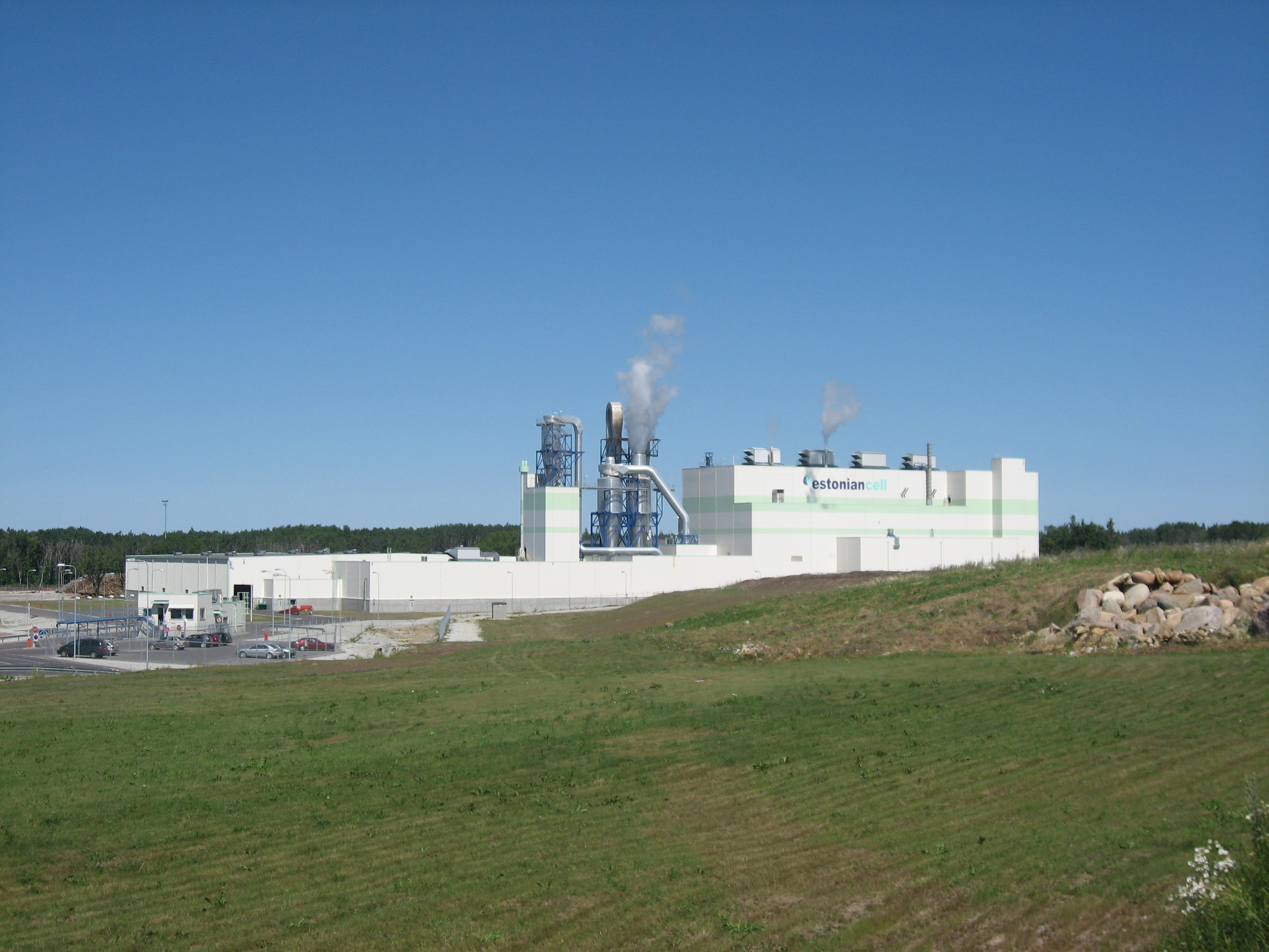 Kunda, nově postavená továrna na východě města